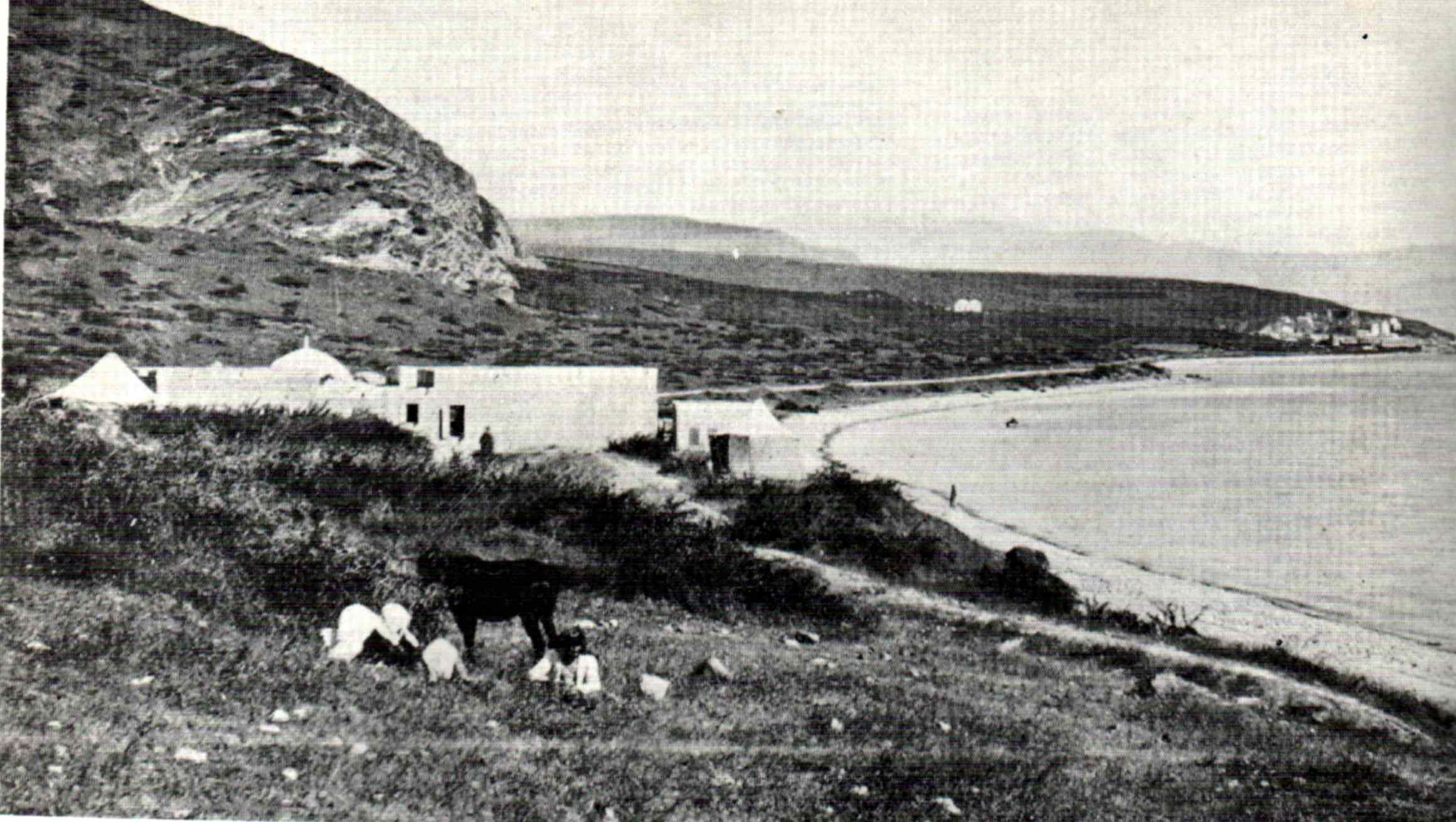 User:Tarawneh/rami